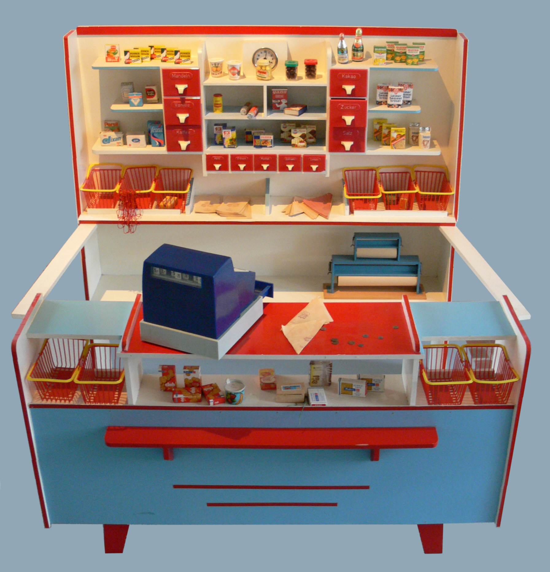 Kaufladen (Spiel-Kaufladen), Kindler & Briel (Kibri), Böblingen, 1960-1962 Schlossmuseum Aulendorf (Zweigmuseum des Württembergischen Landesmuseums)